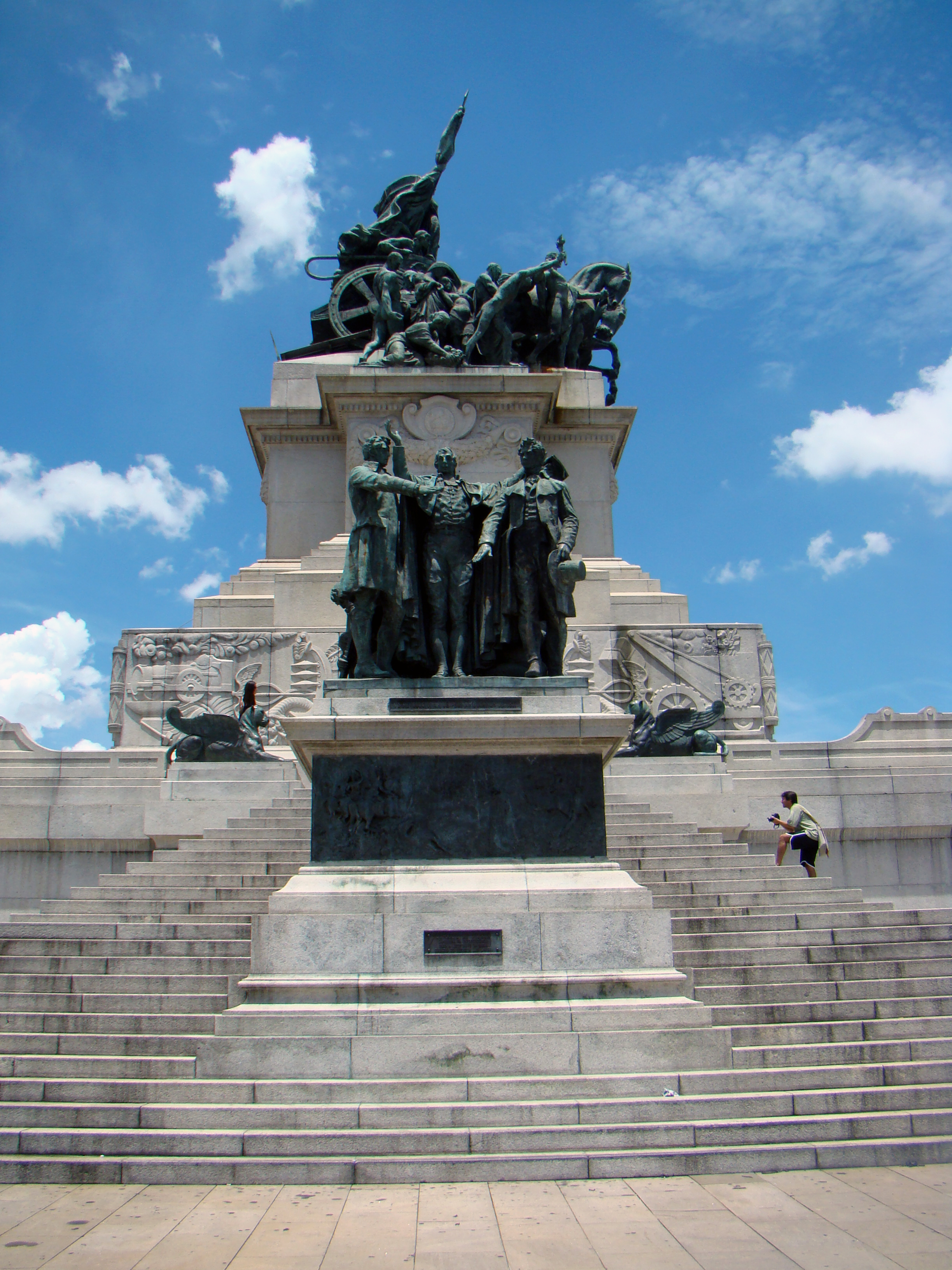 Lateral direita do Monumento à Independência do Brasil: grupo escultórico em bronze que representa “Os Revolucionários Pernambucanos de 1817” - São Paulo capital, Brasil.